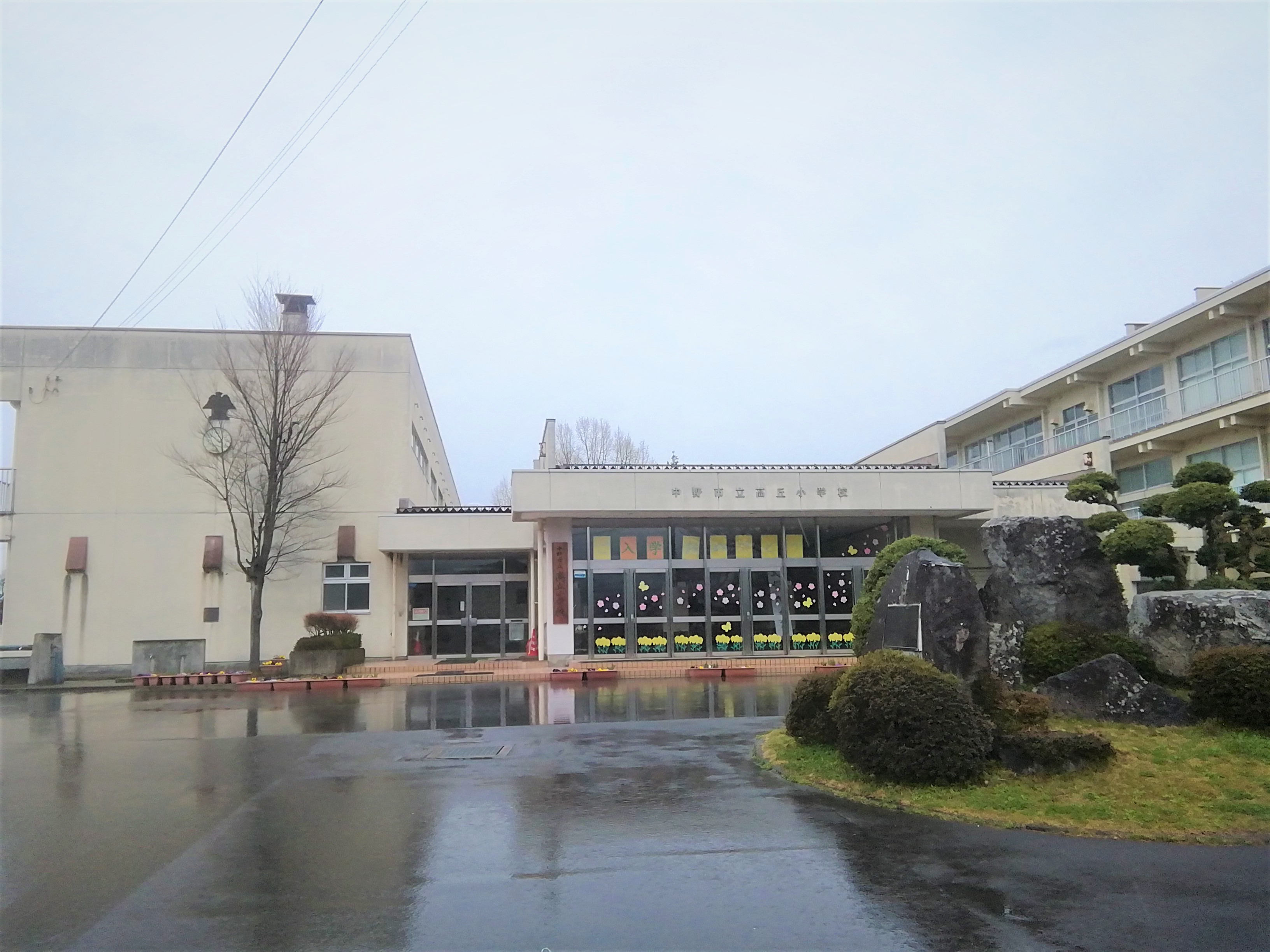 中野市立高丘小学校（2020-4-1）